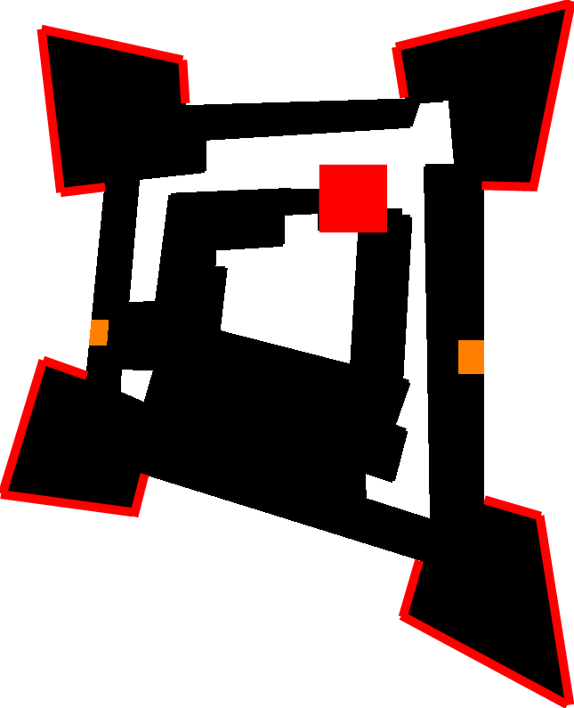 castello di lecce visto dall'alto